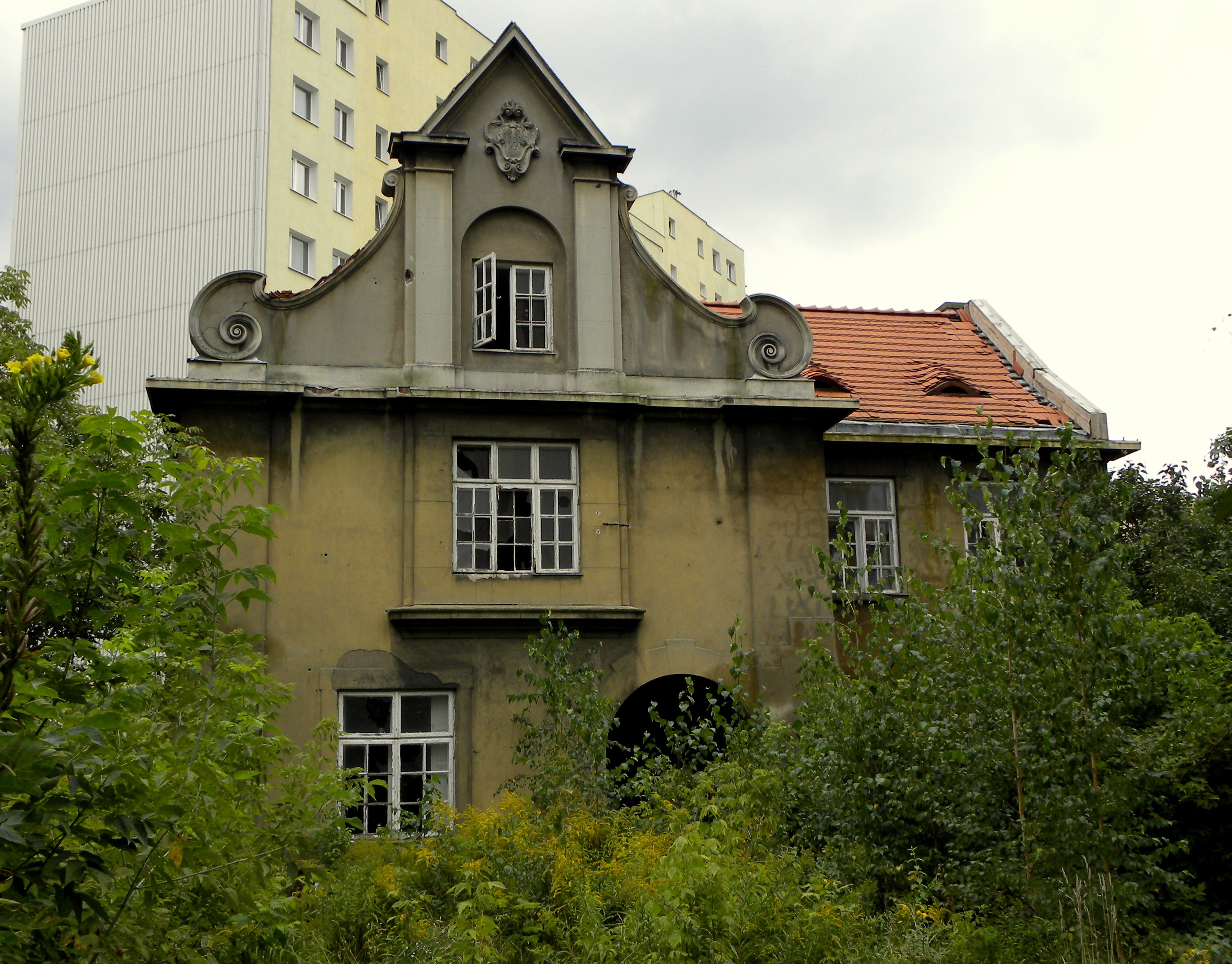 Warszawa ul. Tykocińska 15, willa z 1930.